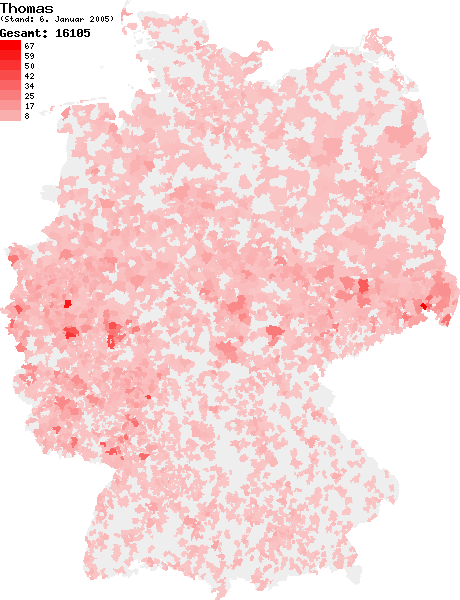 Verteilung des Nachnamens Thomas in Deutschland nach dem Telefonbuch mit Stand vom 6. Januar 2005